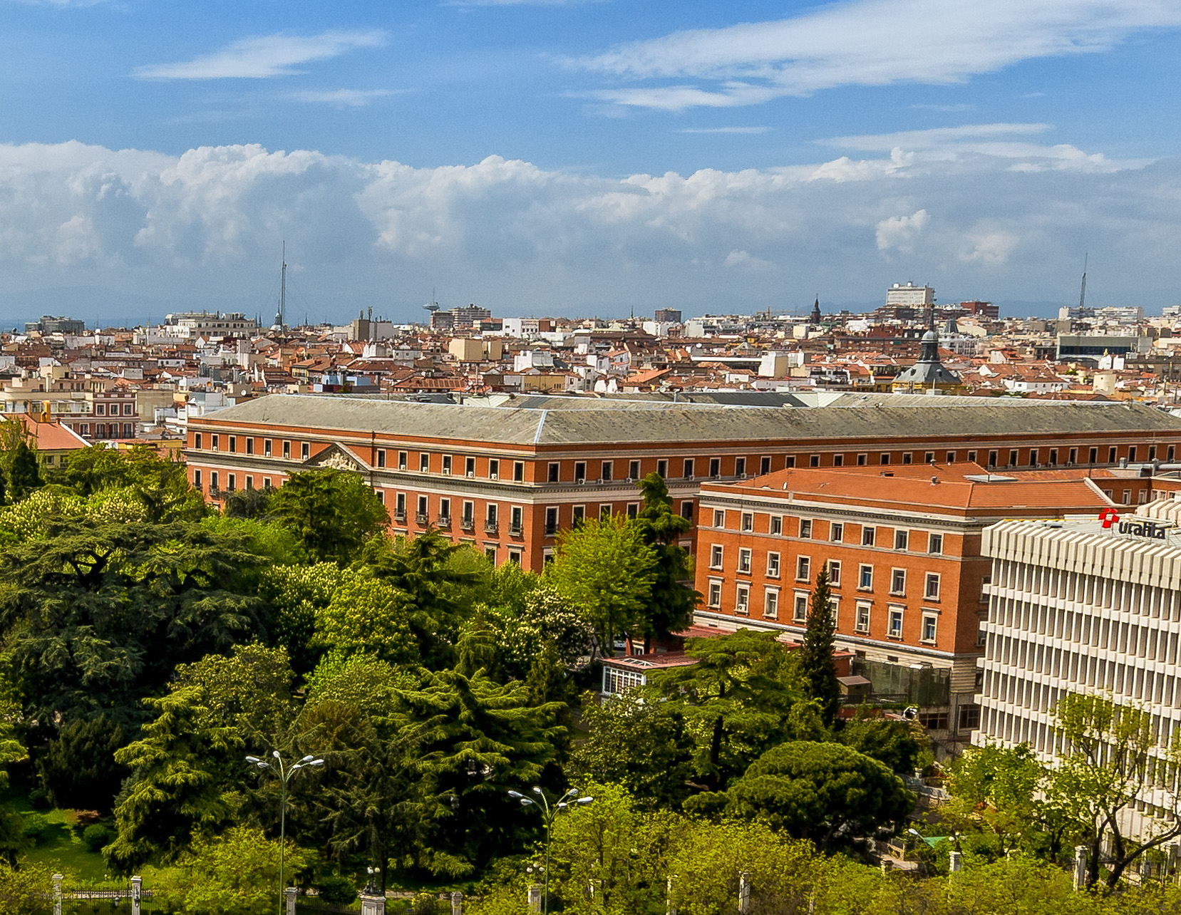 Palacio de Buenavista, Madrid, España.